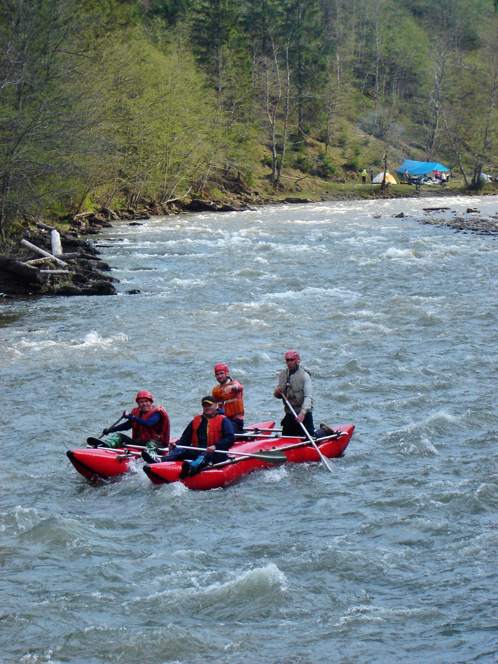 Сплав на плотах по Чорному Черемошу коло Бистреця